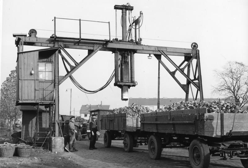 Brühler Zuckerfabrik, Oktober 1957 Rübenwäsche